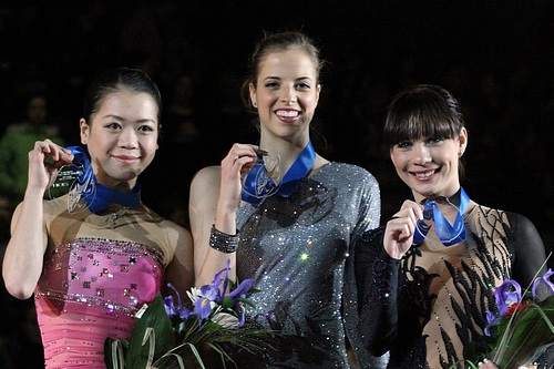 Подиум финала Гран-при по фигурному катанию сезона 2011-2012 в женском одиночном катании. Слева на право: Акико Судзуки (2-е место), Каролина Костнер (1-е место), Алёна Леонова (3-е место)